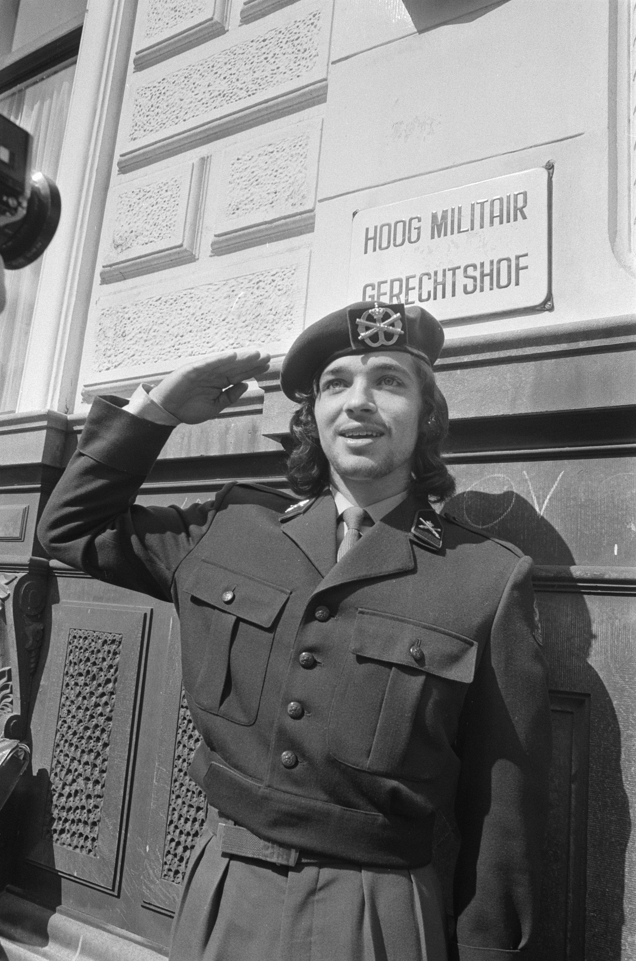 Rinus Wehrmann bij het Hoog Militair Gerechtshof, 23 juni 1971